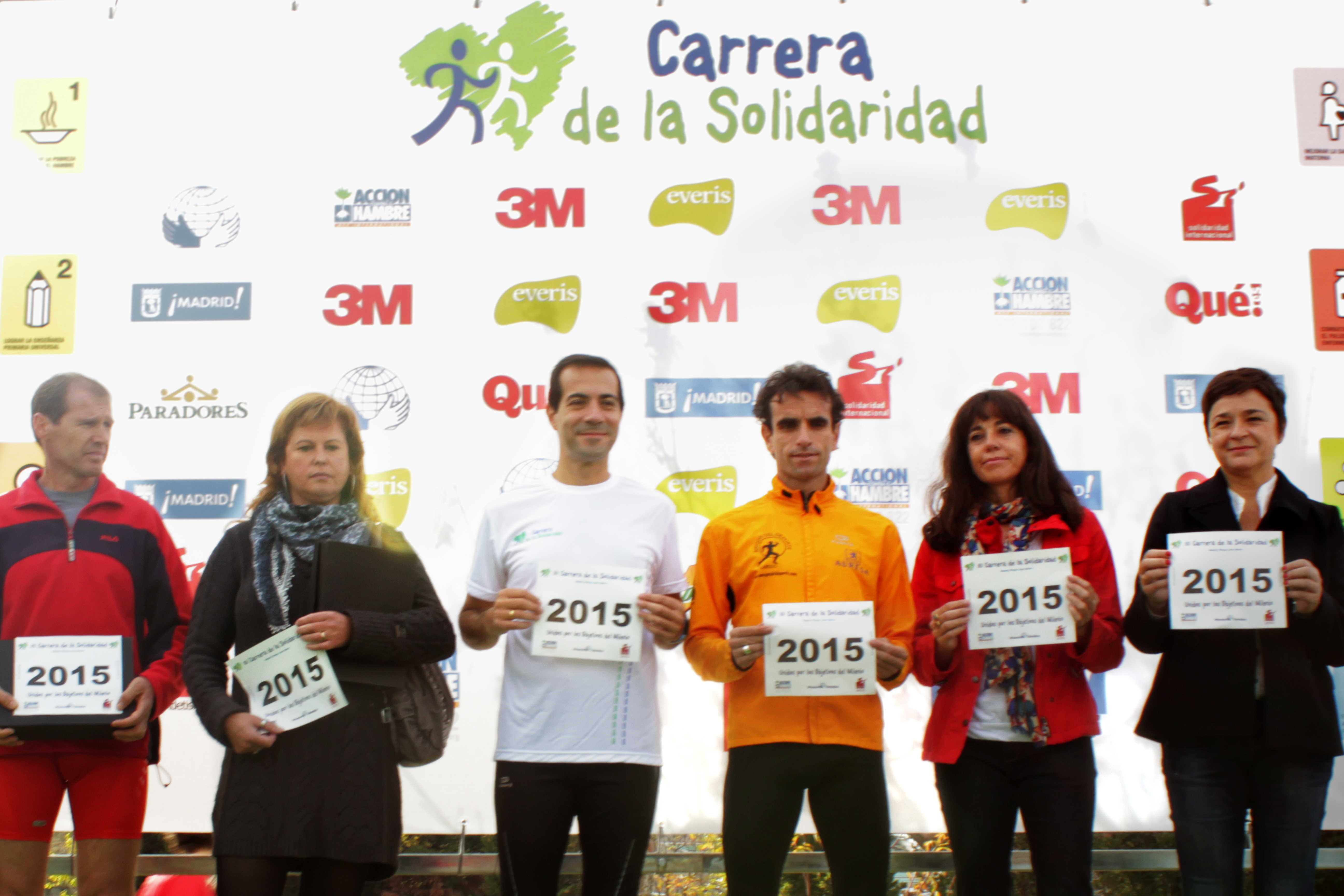 Los Premios Príncipe de Asturias de los Deportes Alberto Juzdado y Fabián Roncero, la Directora de Deportes del Ayuntamiento de Madrid, Mercedes Coghen, el Consejero de Asuntos Sociales de la Comunidad de Madrid, Salvador Victoria Bolívar, y la Coordinadora en España de la Campaña del Milenio de Naciones Unidas, Amalia Navarro piden el cumplimiento de los Objetivos de Desarrollo del Milenio en la Carrera de la Solidaridad 2011